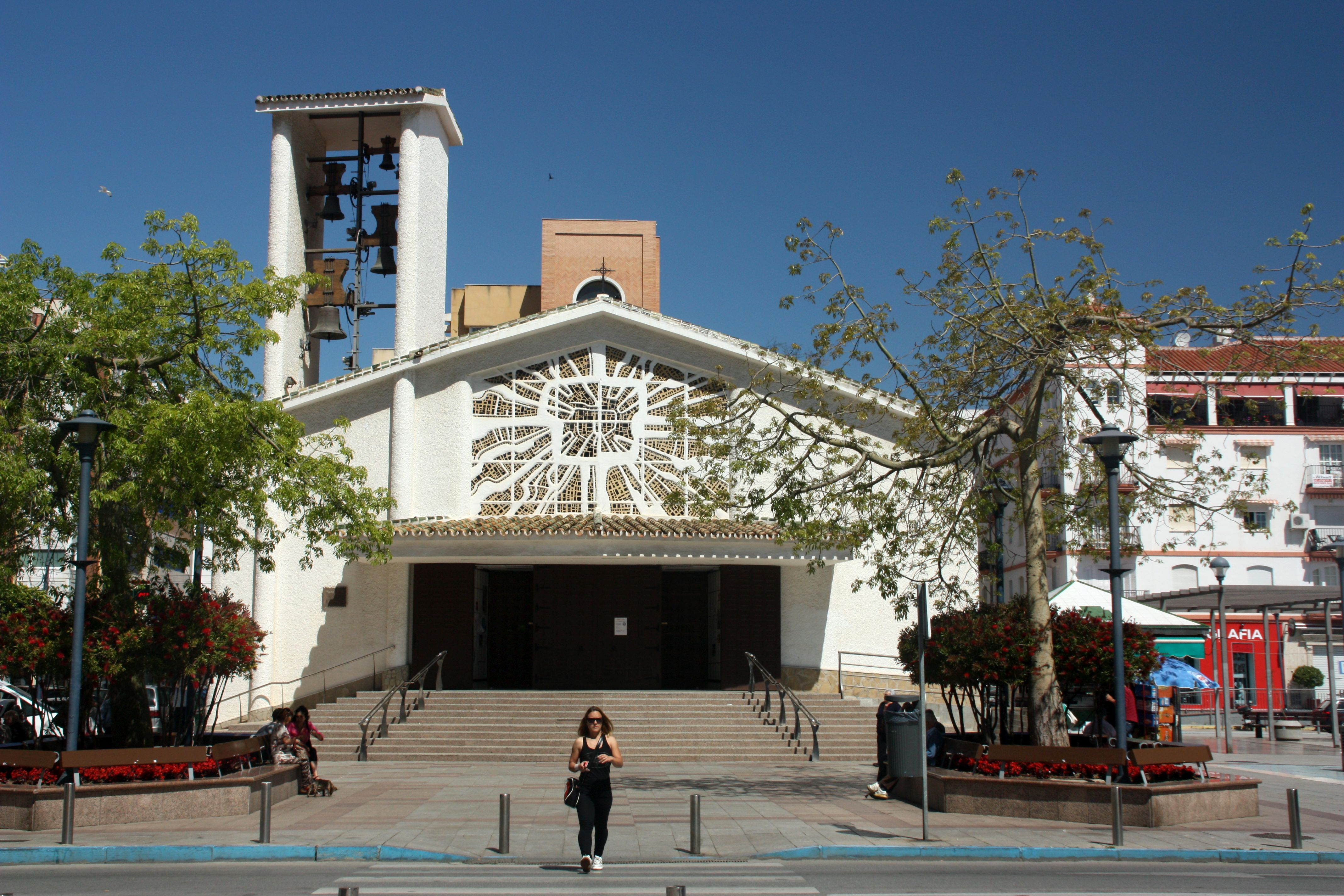 Kirche Parroquia de San André Apóstol